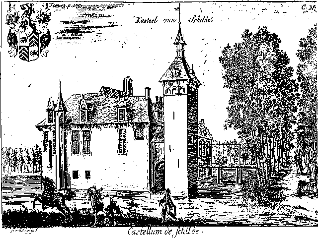 gravure van kasteel van Schilde